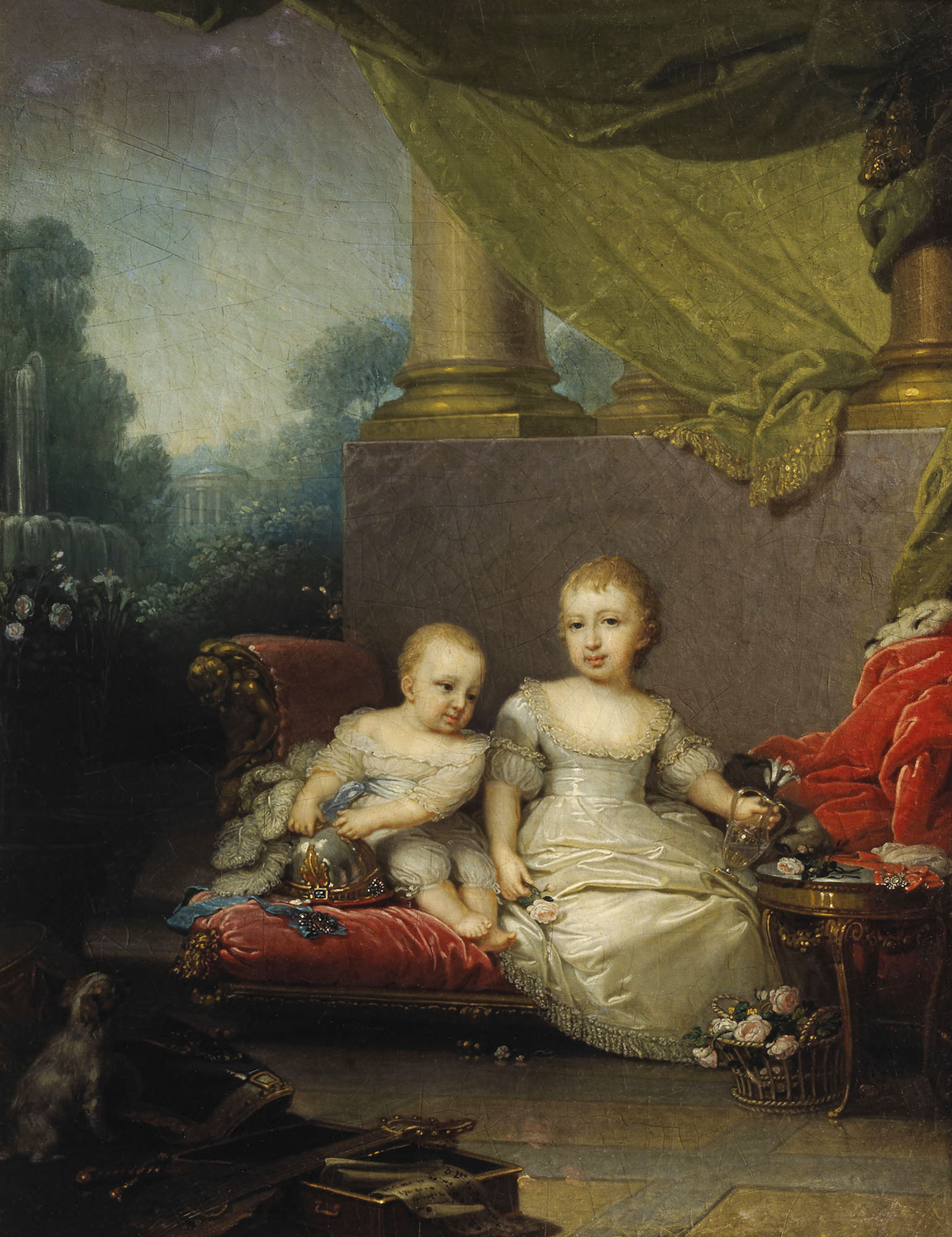 Поррет великого князя Николая Павловича и великой княжны Анны Павловны, детей Павла I